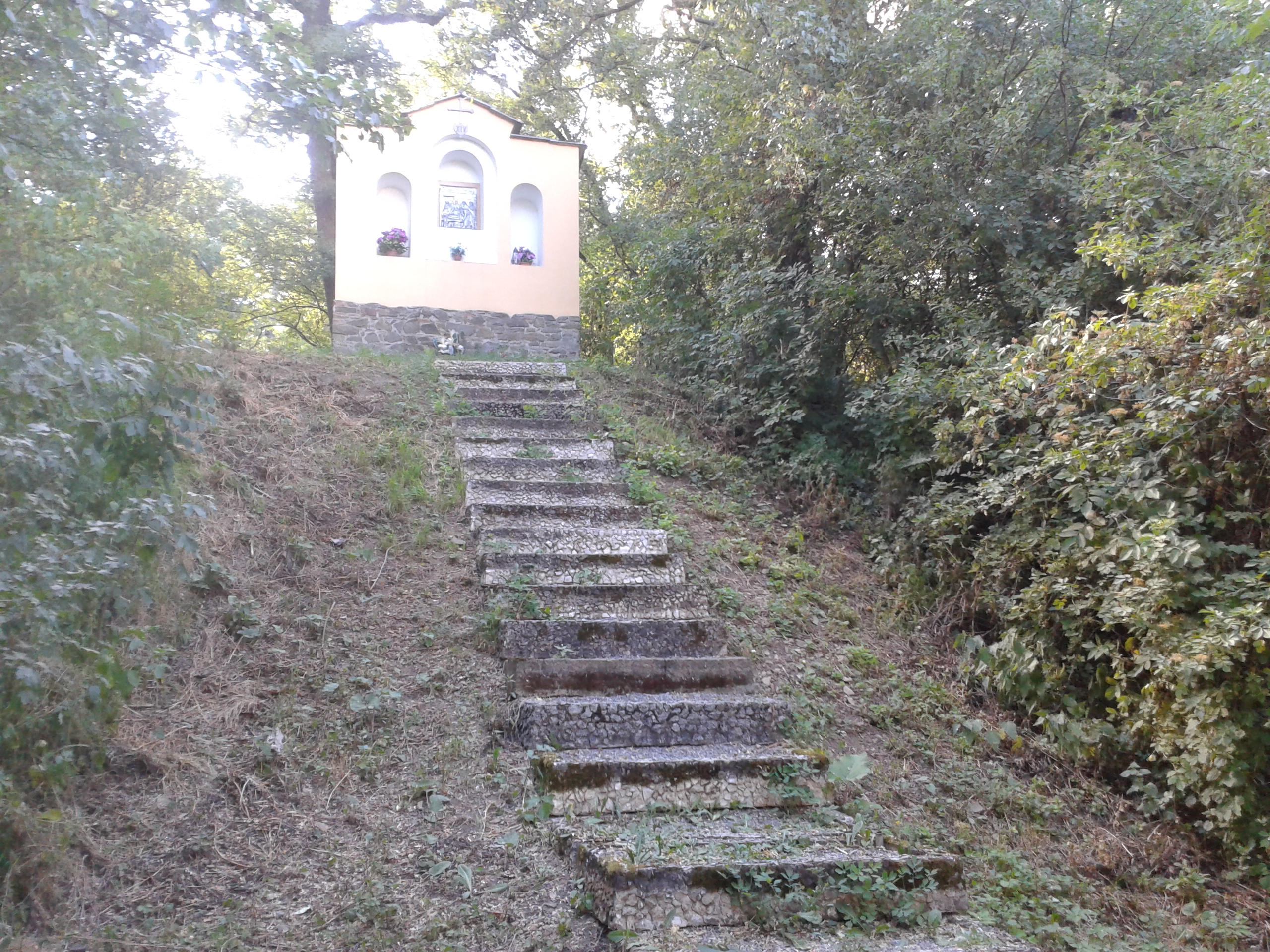 Tvrz Starý zámek, mezi kostelem sv. Martina a roklí též konec křížové cesty.